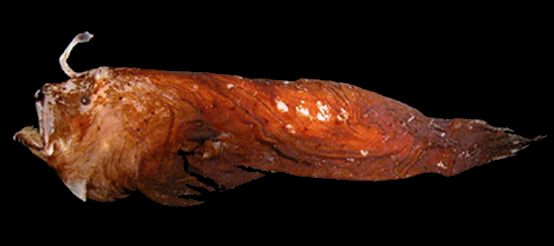 Spiniphryne duhameli Pietsch and Baldwin, 117 mm SL, SIO 60-239.